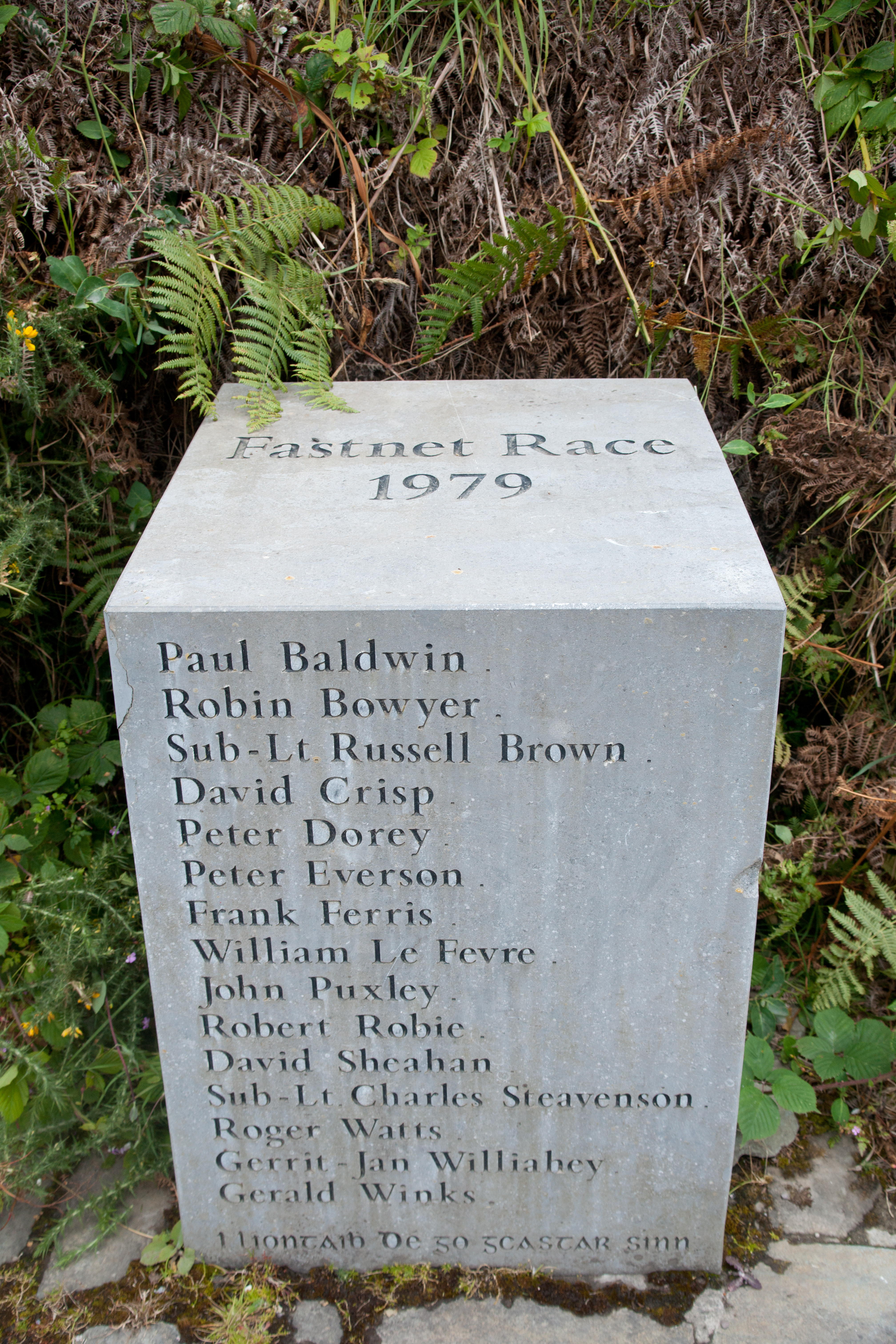 Mémorial de la course du Fastnet 1979.